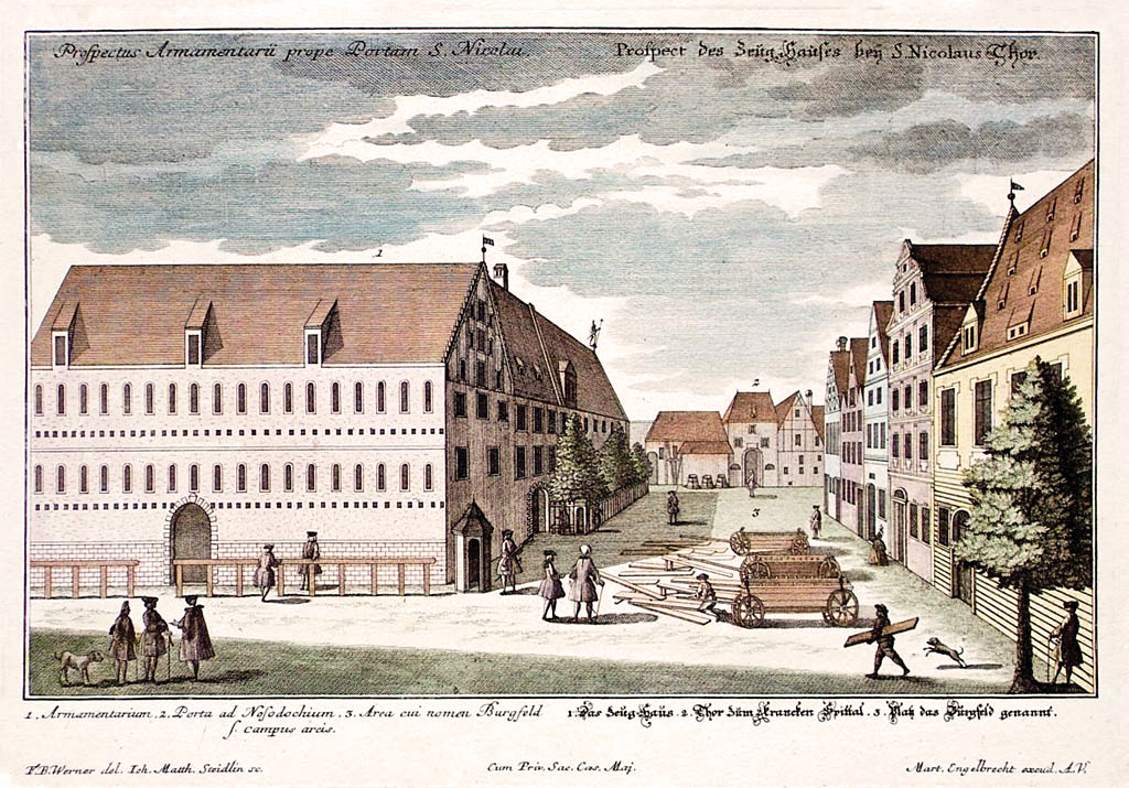 Grafika przedstawiająca ulicę Cieszyńskiego około roku 1730 wykonana przez Jana Macieja Steidlina na podstawie rysunku Fryderyka Bernarda Wernhera